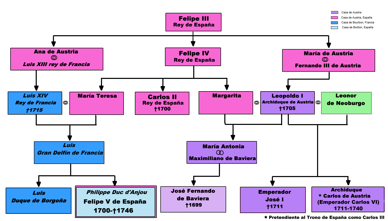 Cuadro genealógico ascendente de Felipe V de Anjou